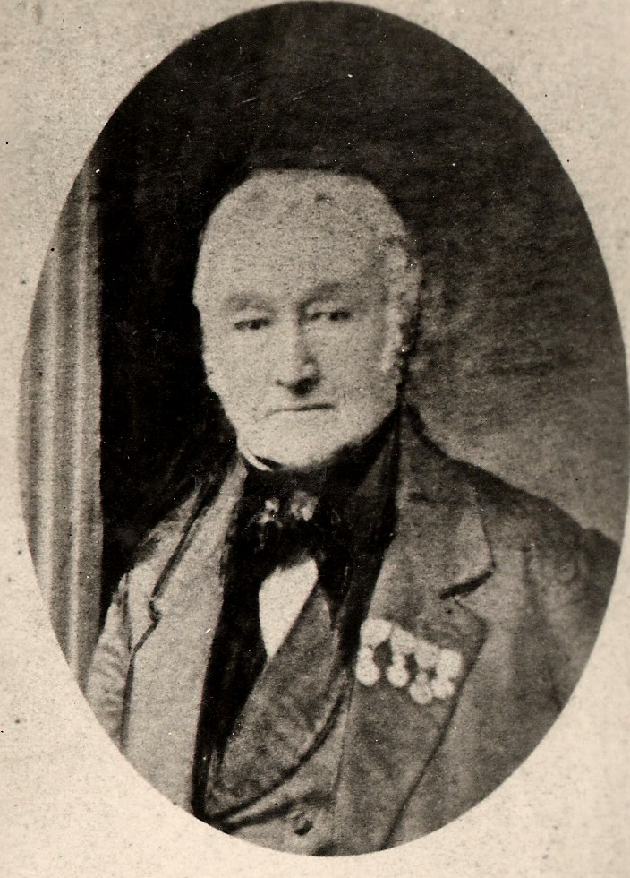 Michel Surmont, burgemeester van Lichtervelde en provincieraadslid in West-Vlaanderen zorgde ervoor dat de spoorlijn Brugge-Kortrijk door Lichtervelde liep.